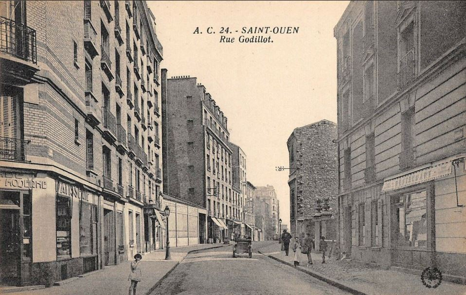 Saint-Ouen-sur-Seine.Rue Godillot.Immeubles